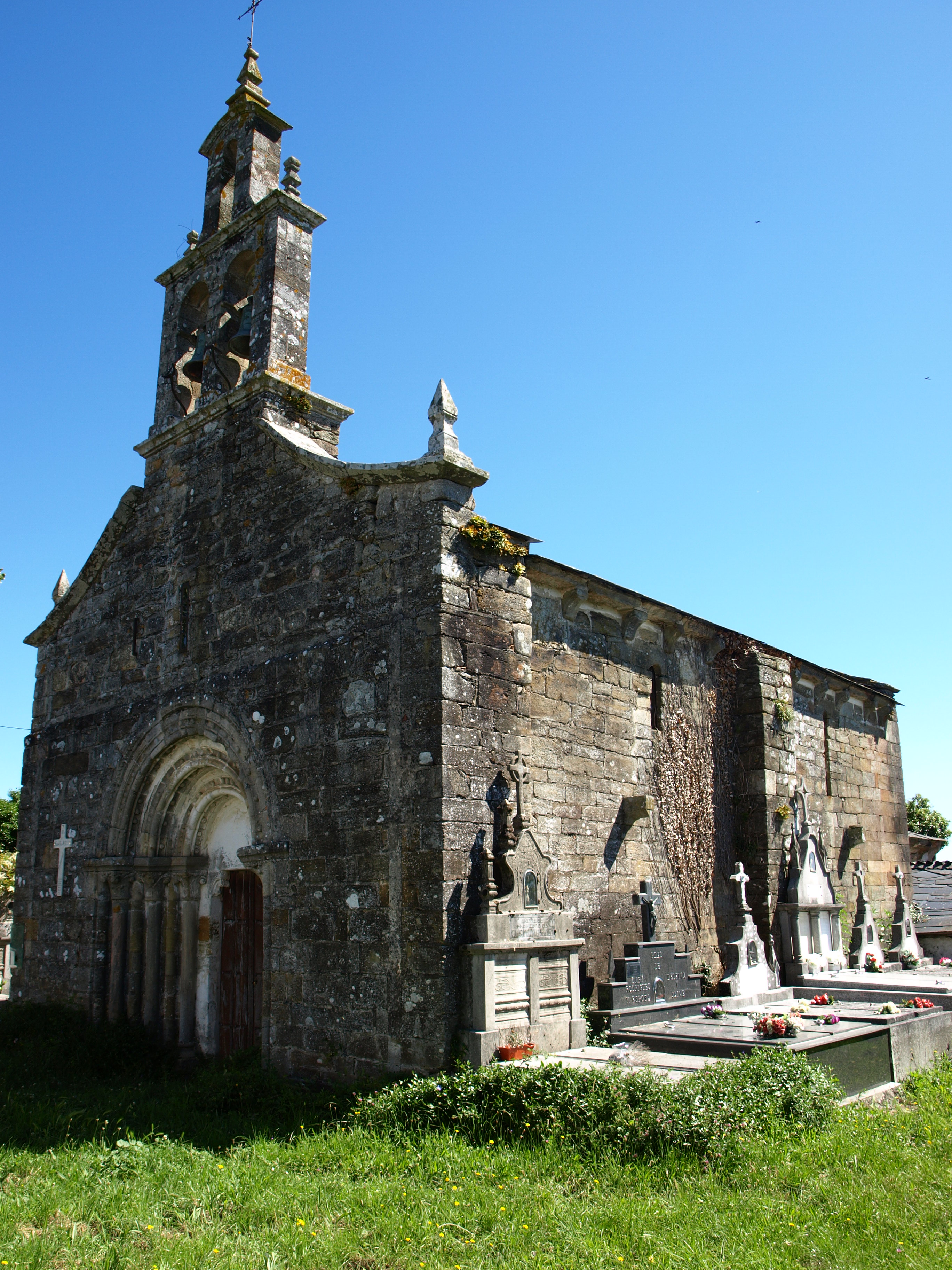 Igrexa parroquial de San Victorio (O Saviñao)